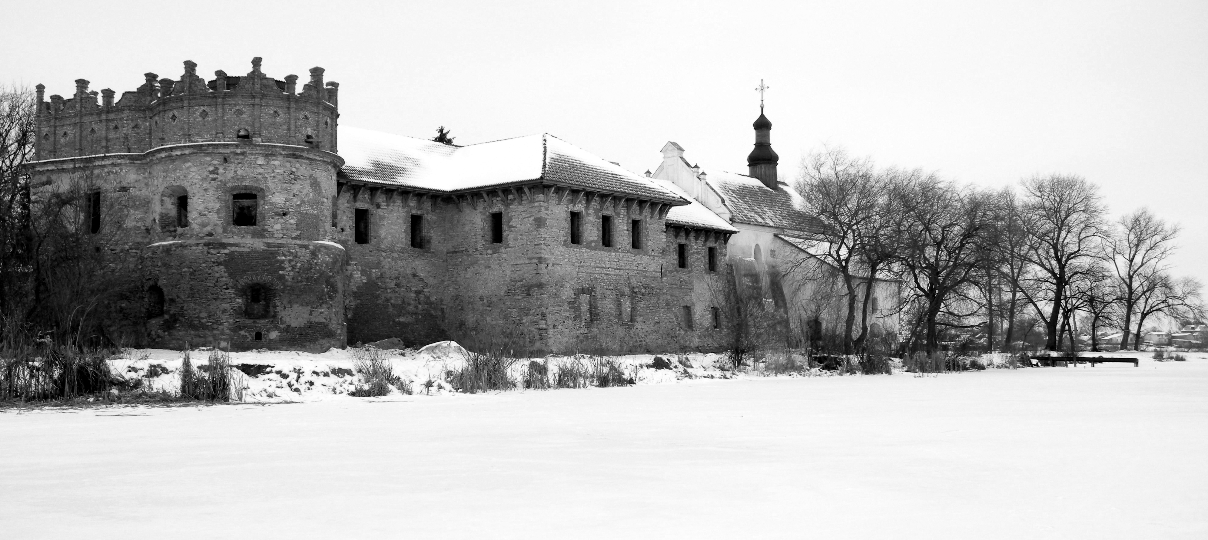 Замок від ставу.